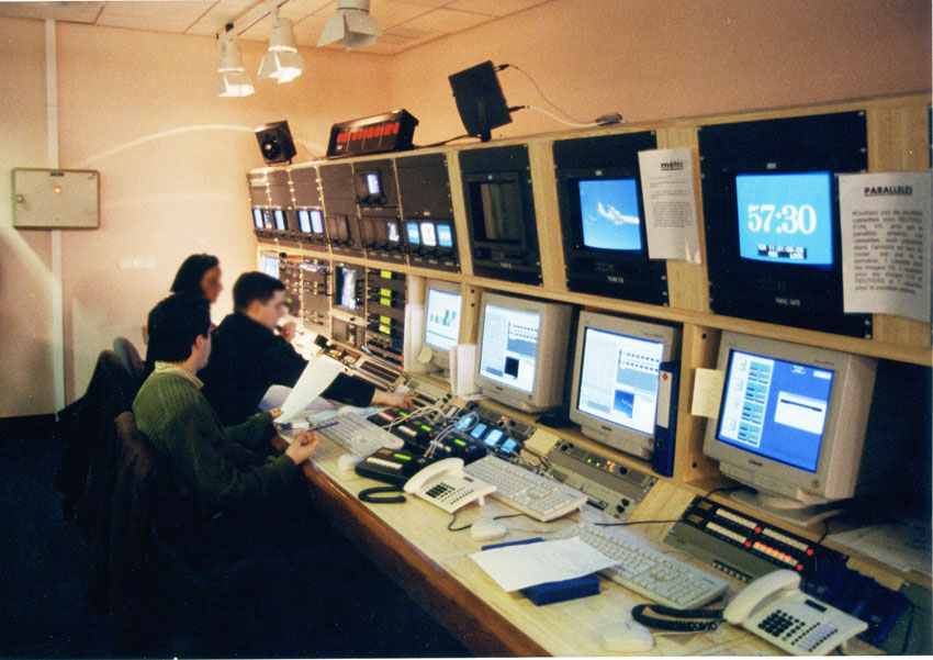 La régie ou "nodal" de la chaîne d'information i-télé le jour de son lancement.